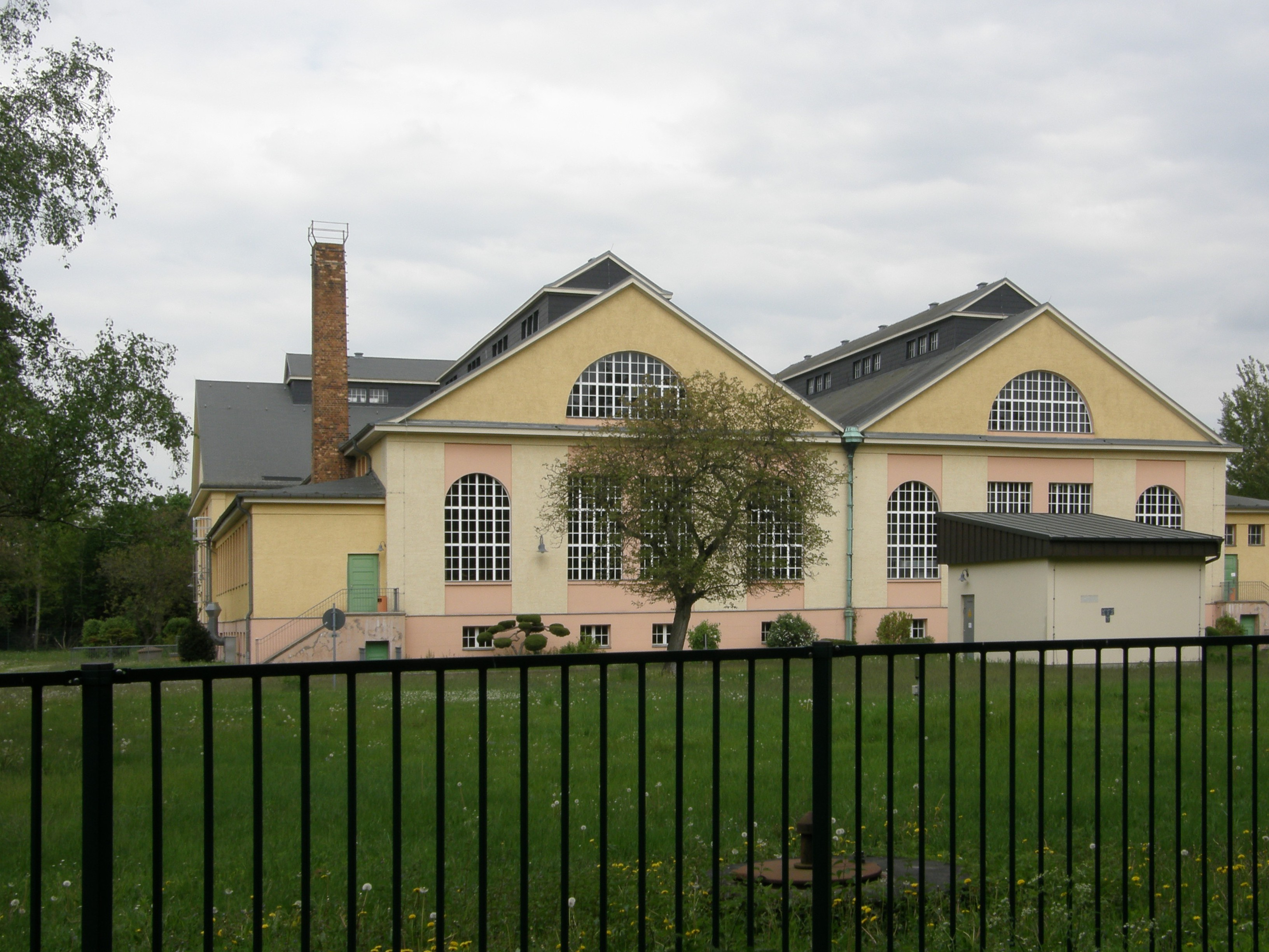 Berlin-Kaulsdorf, Mieltschiner Str., Wasserwerk Kaulsdorf